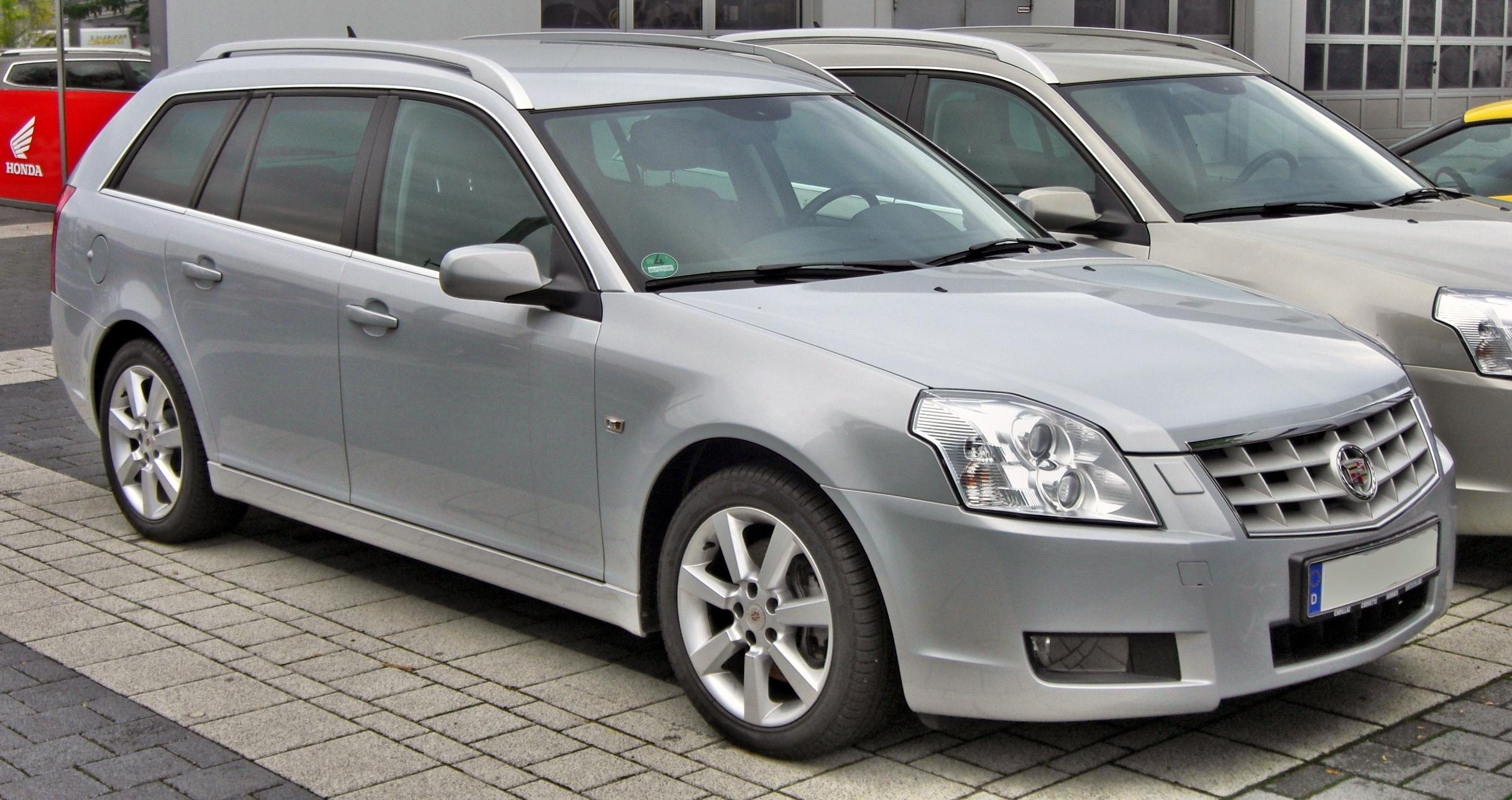 Cadillac BLS Wagon